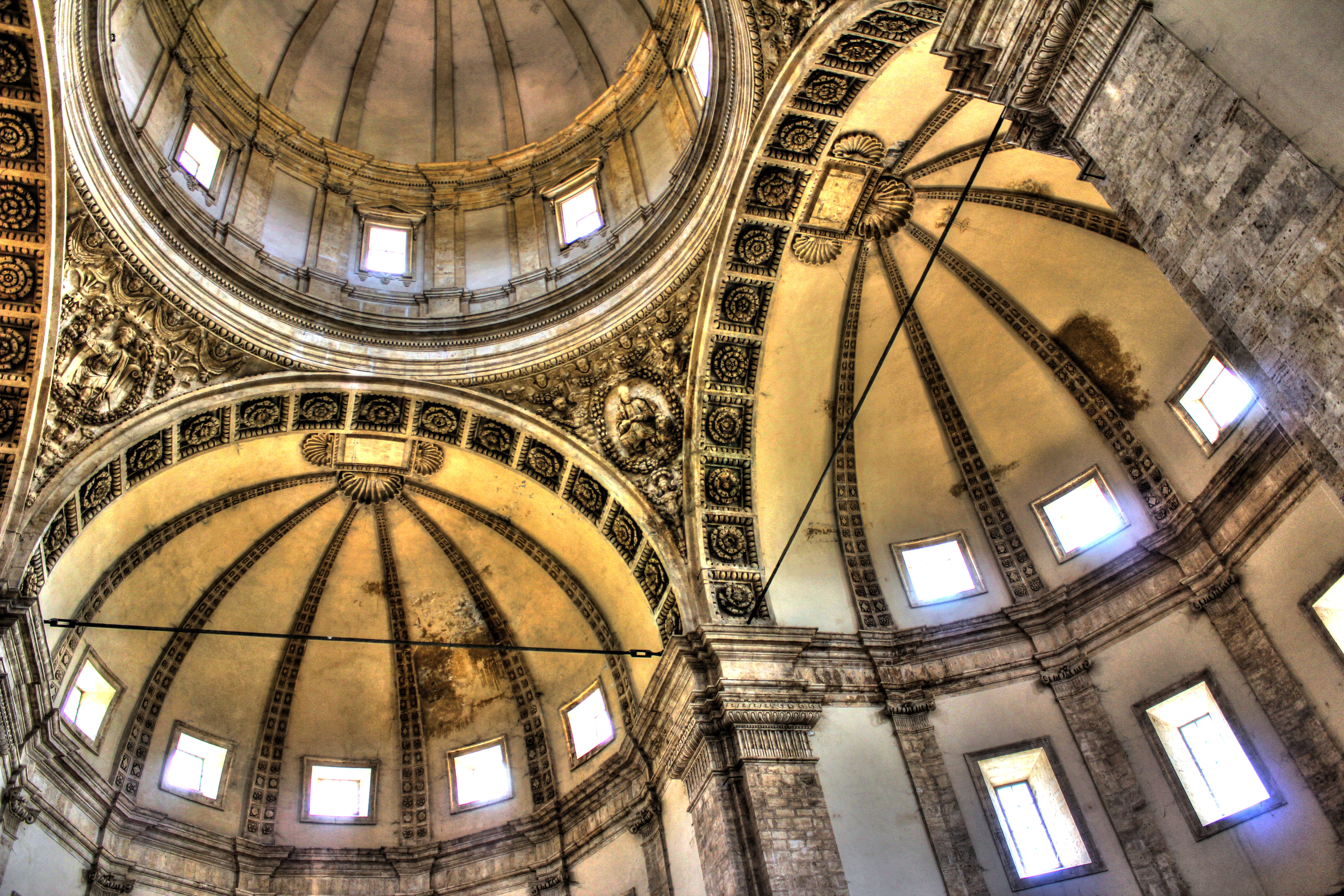 santa maria della consolazione This is a photo of a monument which is part of cultural heritage of Italy.